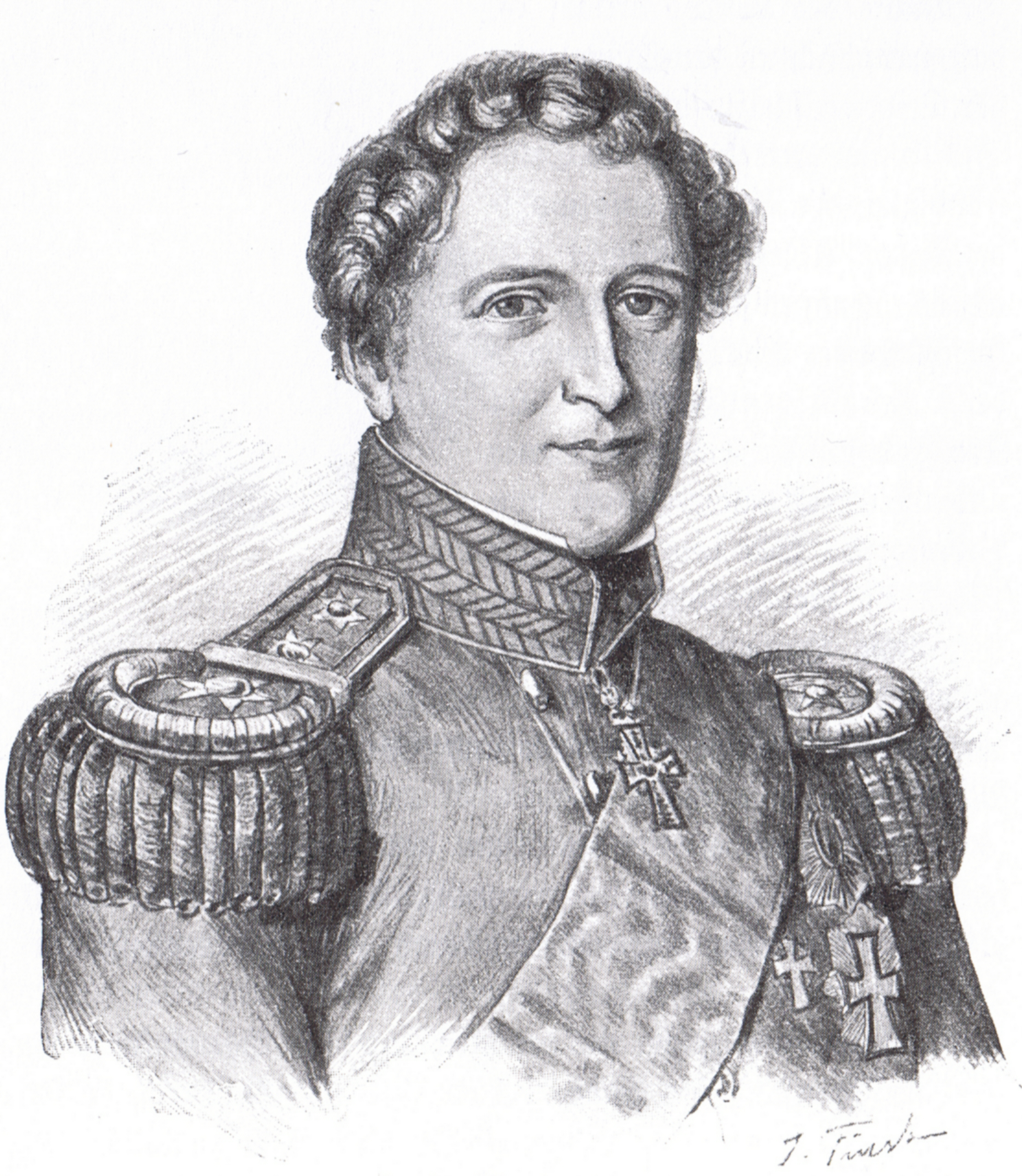 Christian VIII., König von Dänemark und Norwegen, Zeichnung von Julius Fürst um 1895.